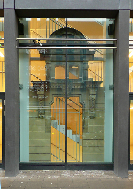 Portal eines historischen Gebäudes in der Ernst-August-Galerie